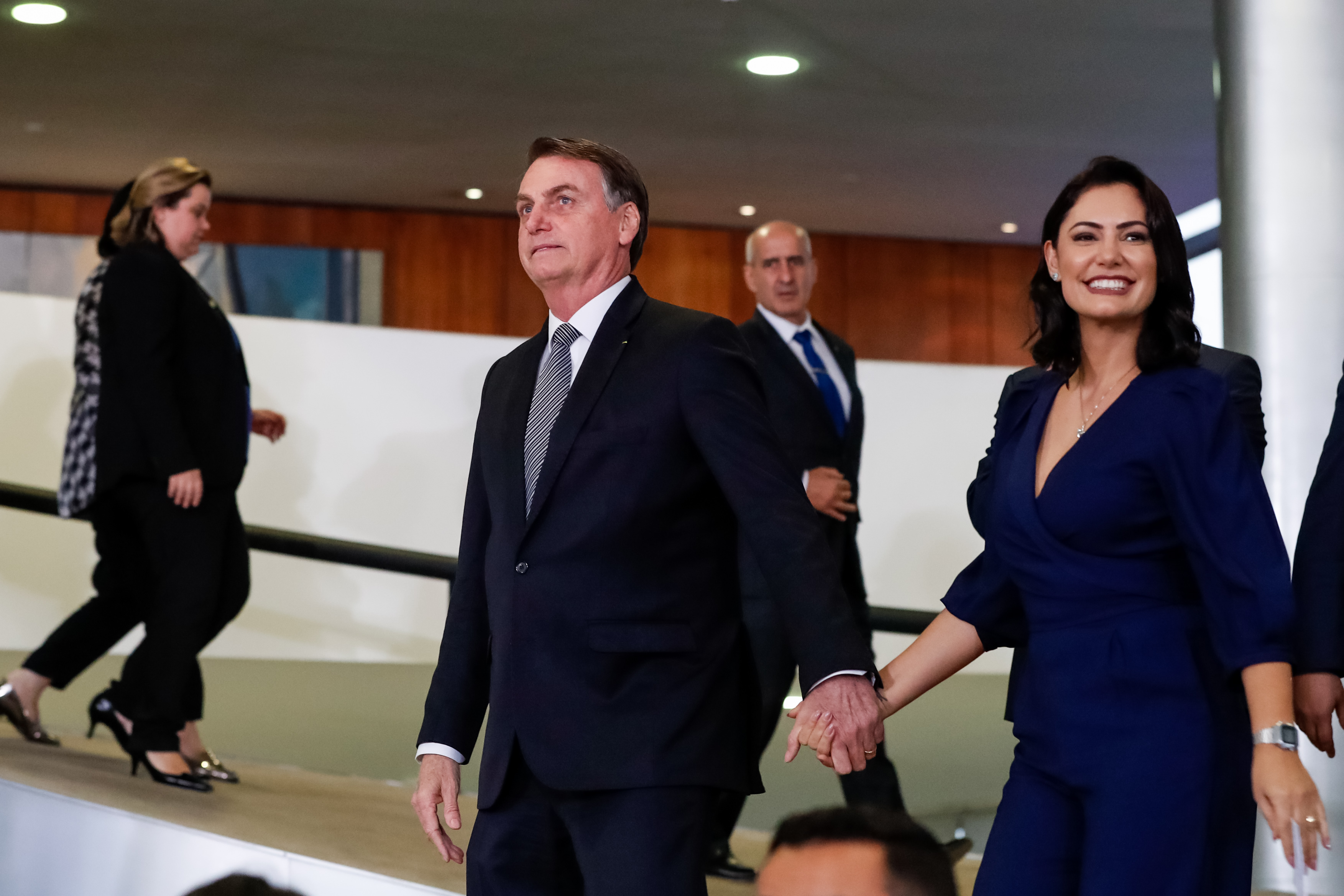 (Brasília - DF, 26/09/2019) Solenidade do Dia Nacional dos Surdos e Lançamento do LibrasGOV. Foto: Carolina Antunes/PR